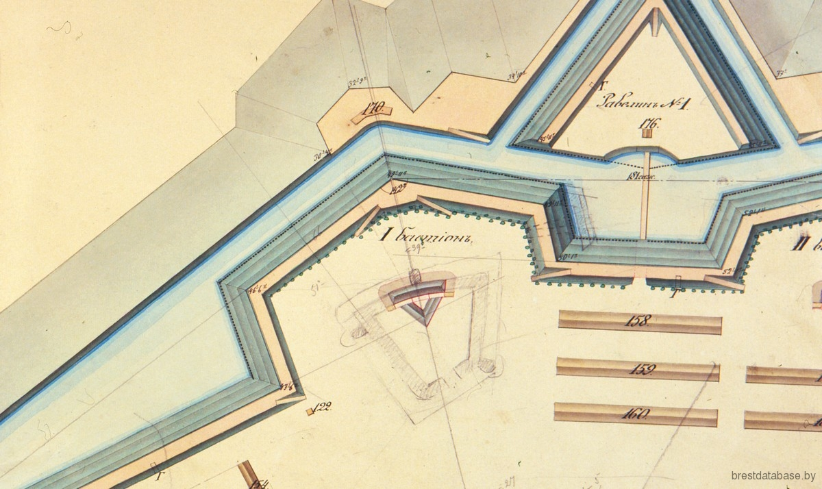 Пишите здесь